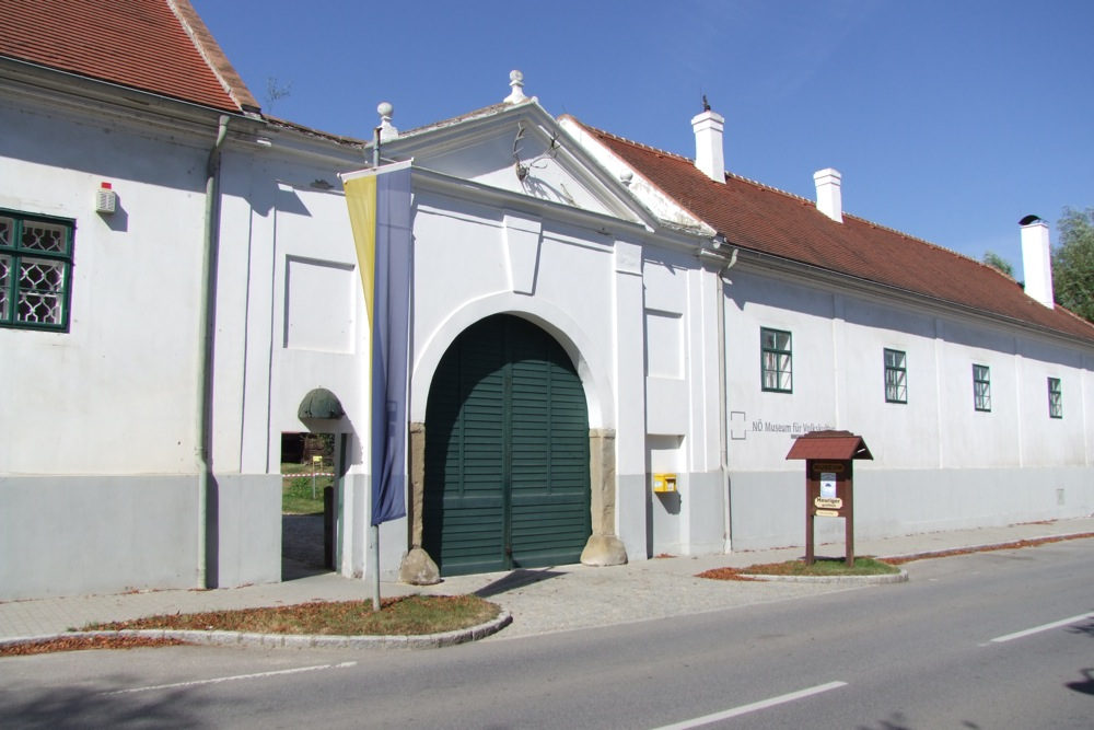 Meierhof/Museum, Groß-Schweinbarth.